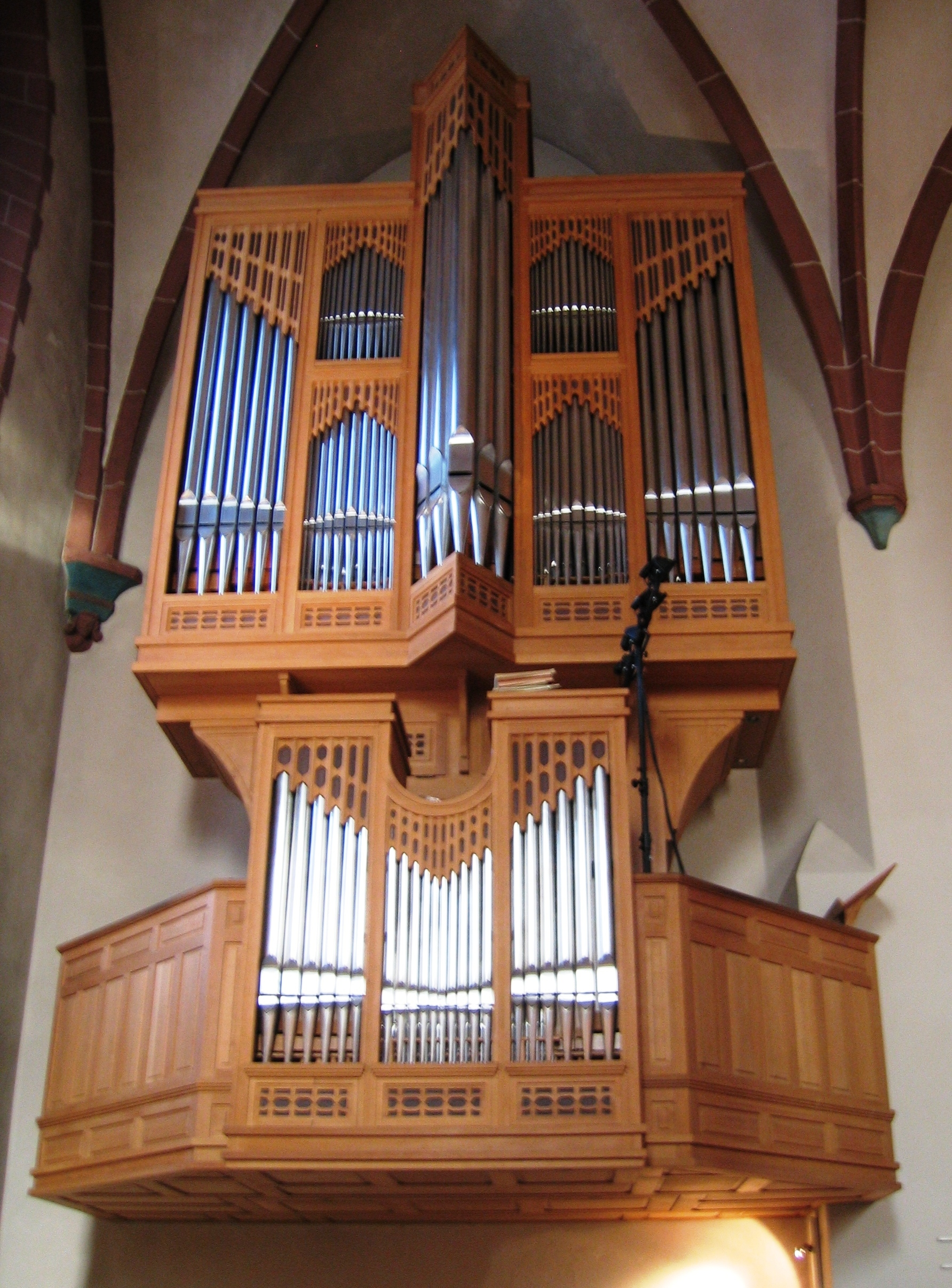 Orgel der Alten Nikolaikirche in Frankfurt am Main.